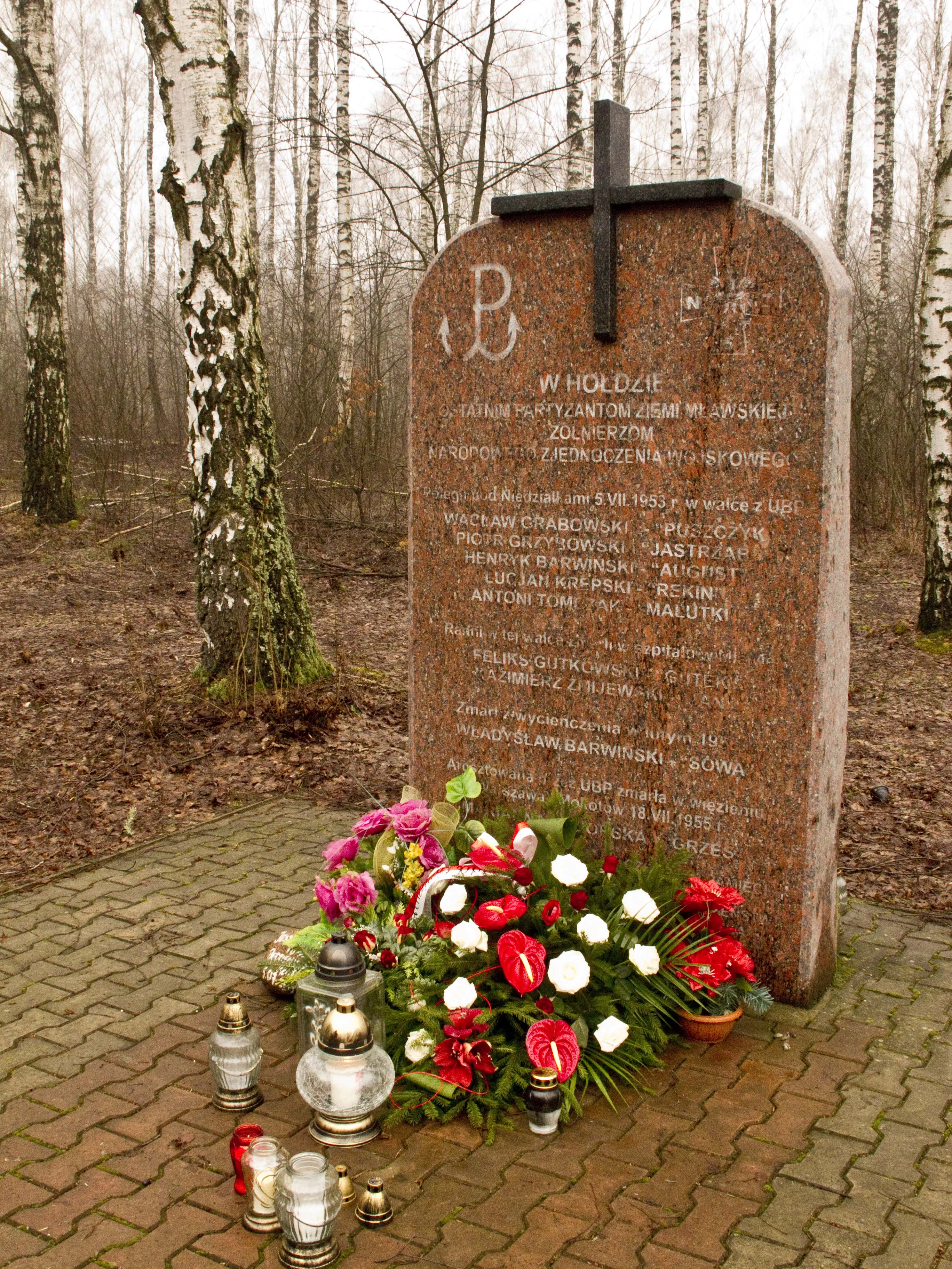 Niedziałki, tablica pamięci